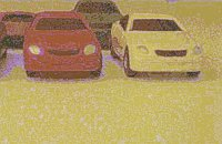 Voorbeeld van het effect van het gemiddelde nemen van meerdere foto's. Deze foto is een enkele foto van een webcam, met zeer weinig licht. Zie ook: nl::Afbeelding:Example-average-2.jpg. Eigen werk. Gemaakt met behulp van gratis en vrij te gebruiken software 'ImageMagick'.